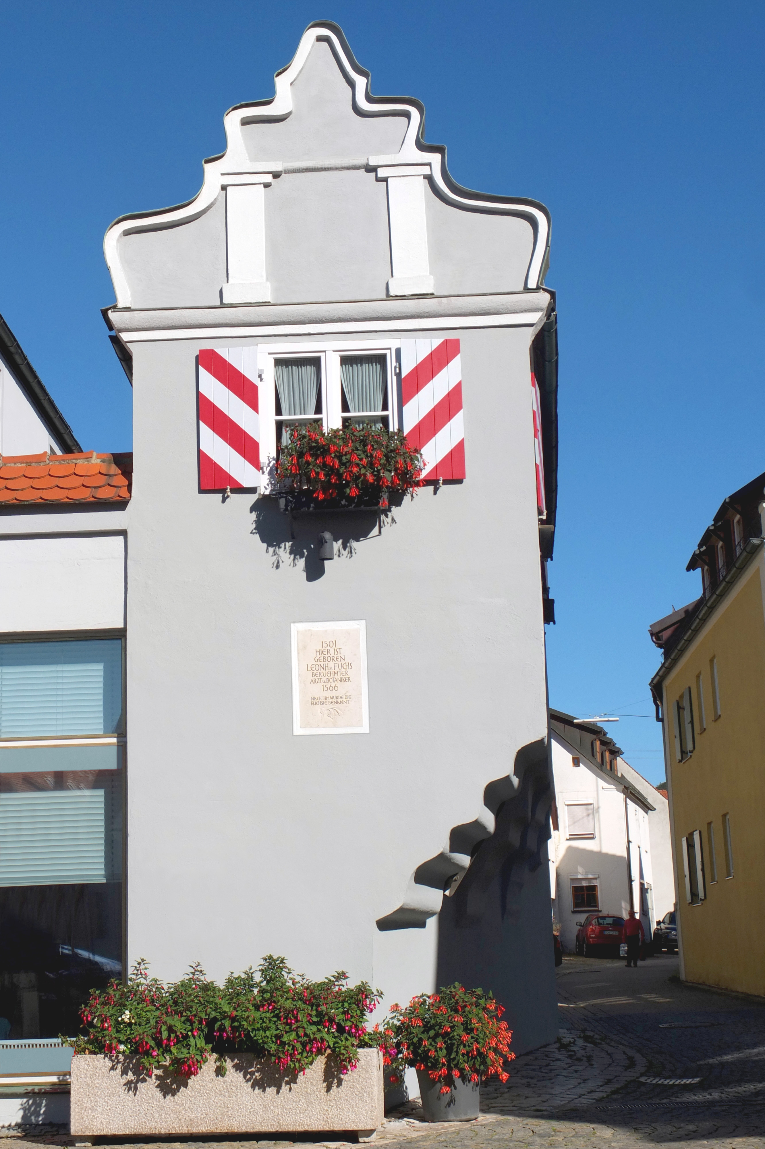 Geburtshaus des Botanikers und Arztes Leonhart Fuchs